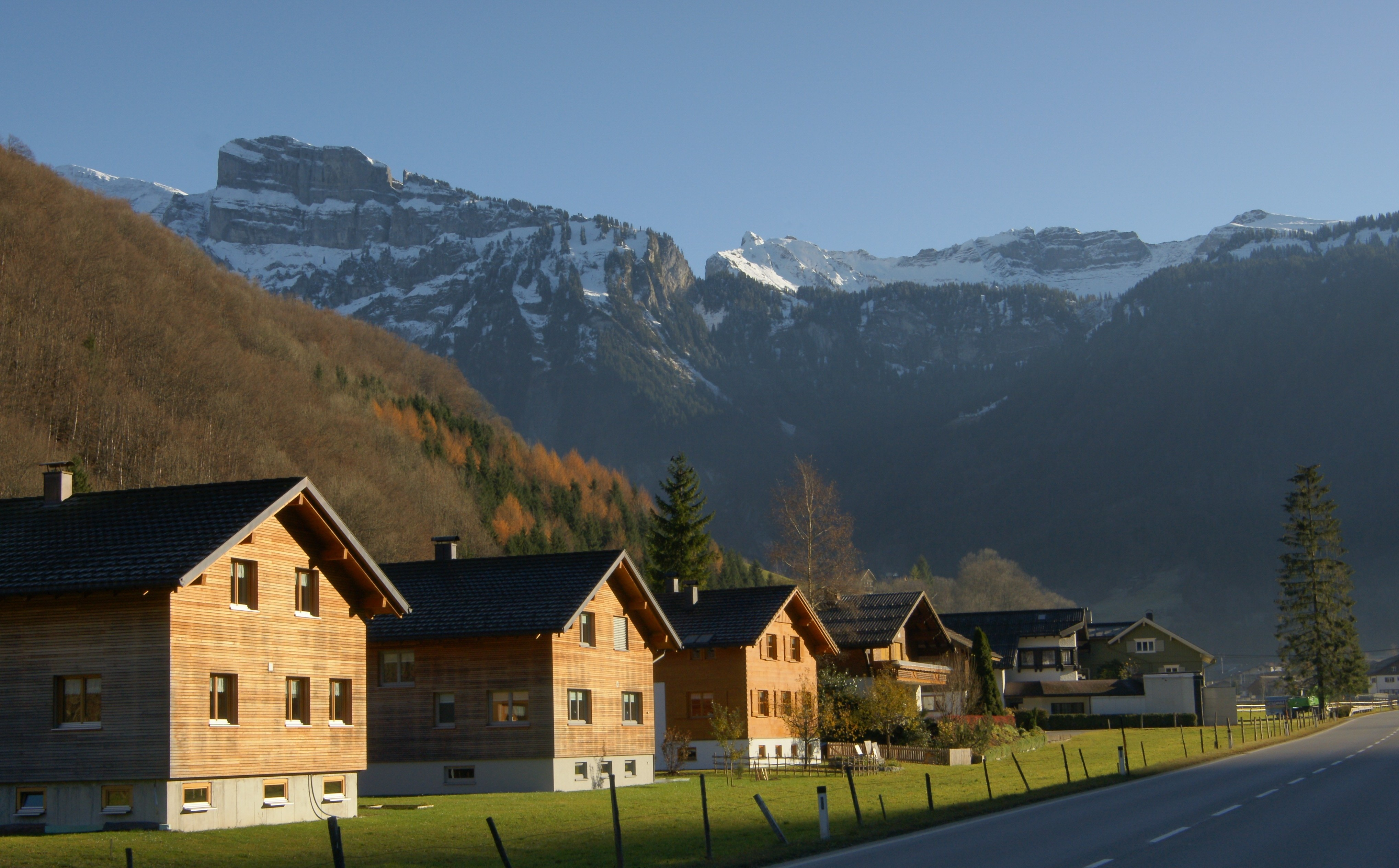 Landstraße Mellau sowie die Nordflanke der Kanisfluh 2.044m.